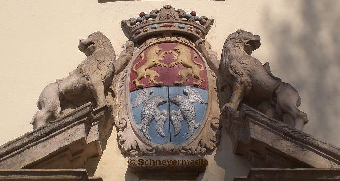 Wappen der Grafen von Brockdorff (Portal Schloss Schney)